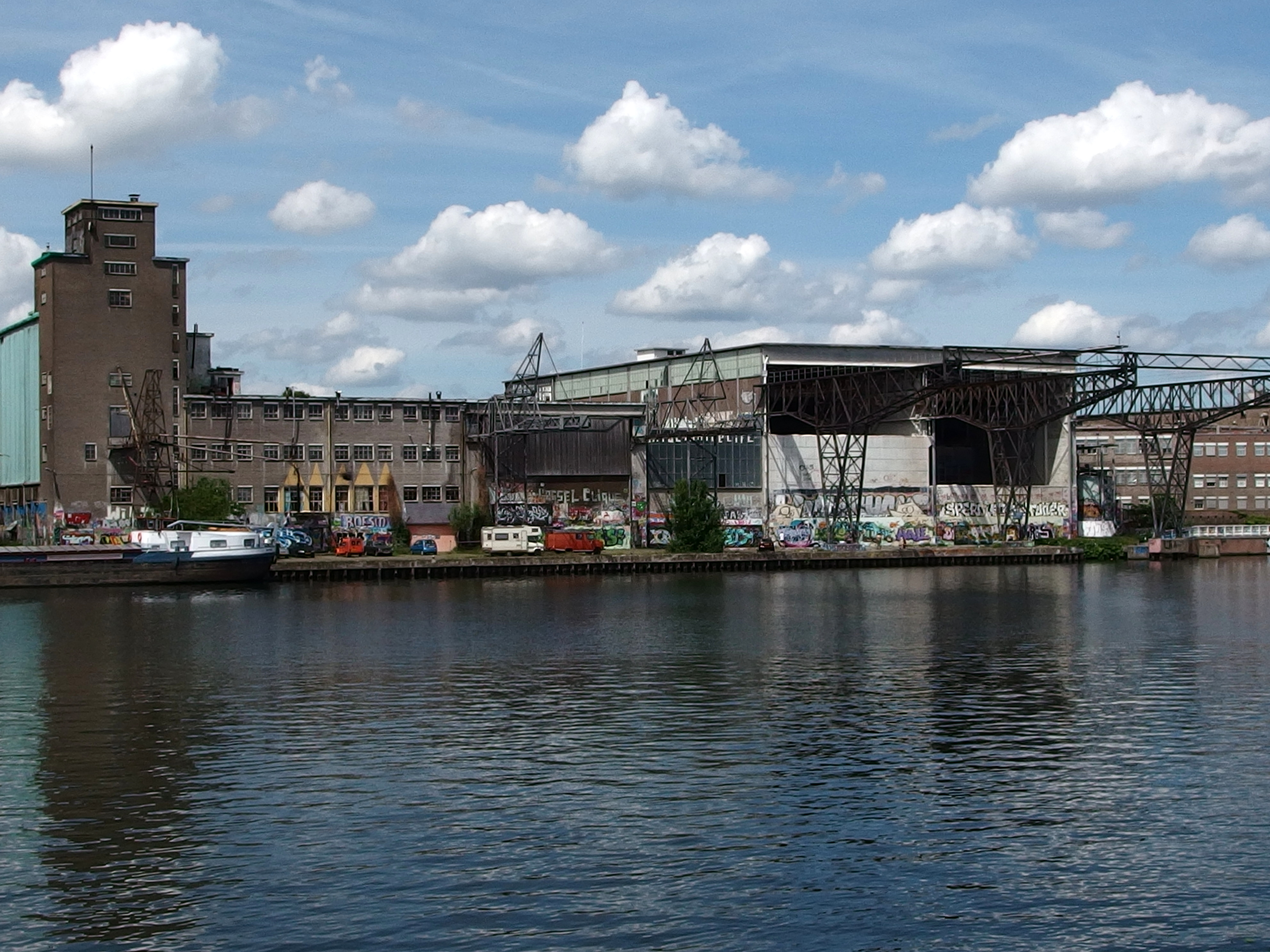 20140525 in Maastricht aan de Maas.